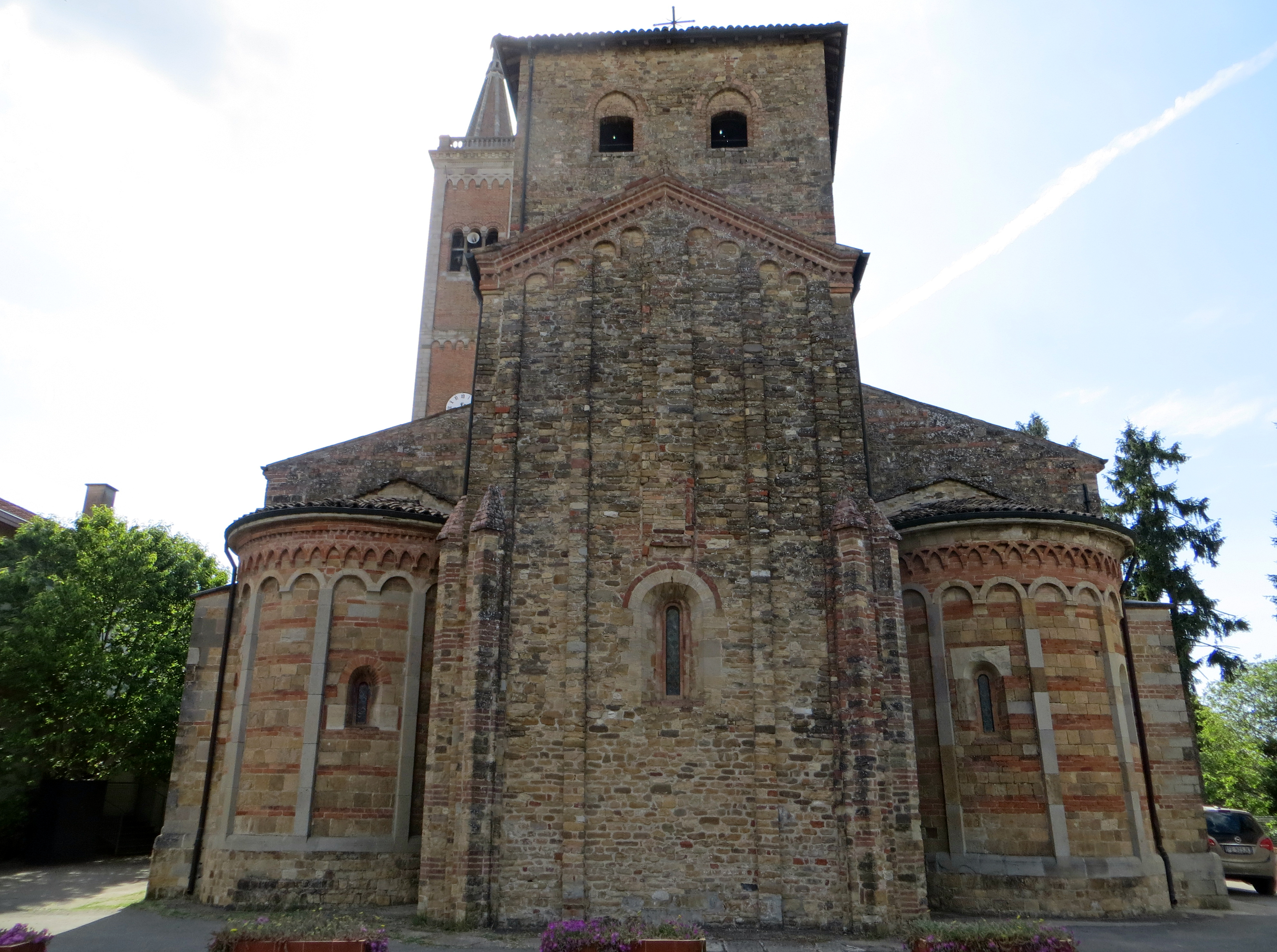 Pieve di San Prospero (Collecchio) - zona absidale